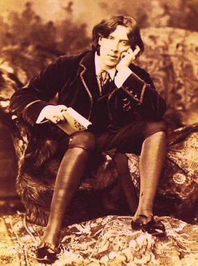 Oscar Wilde student